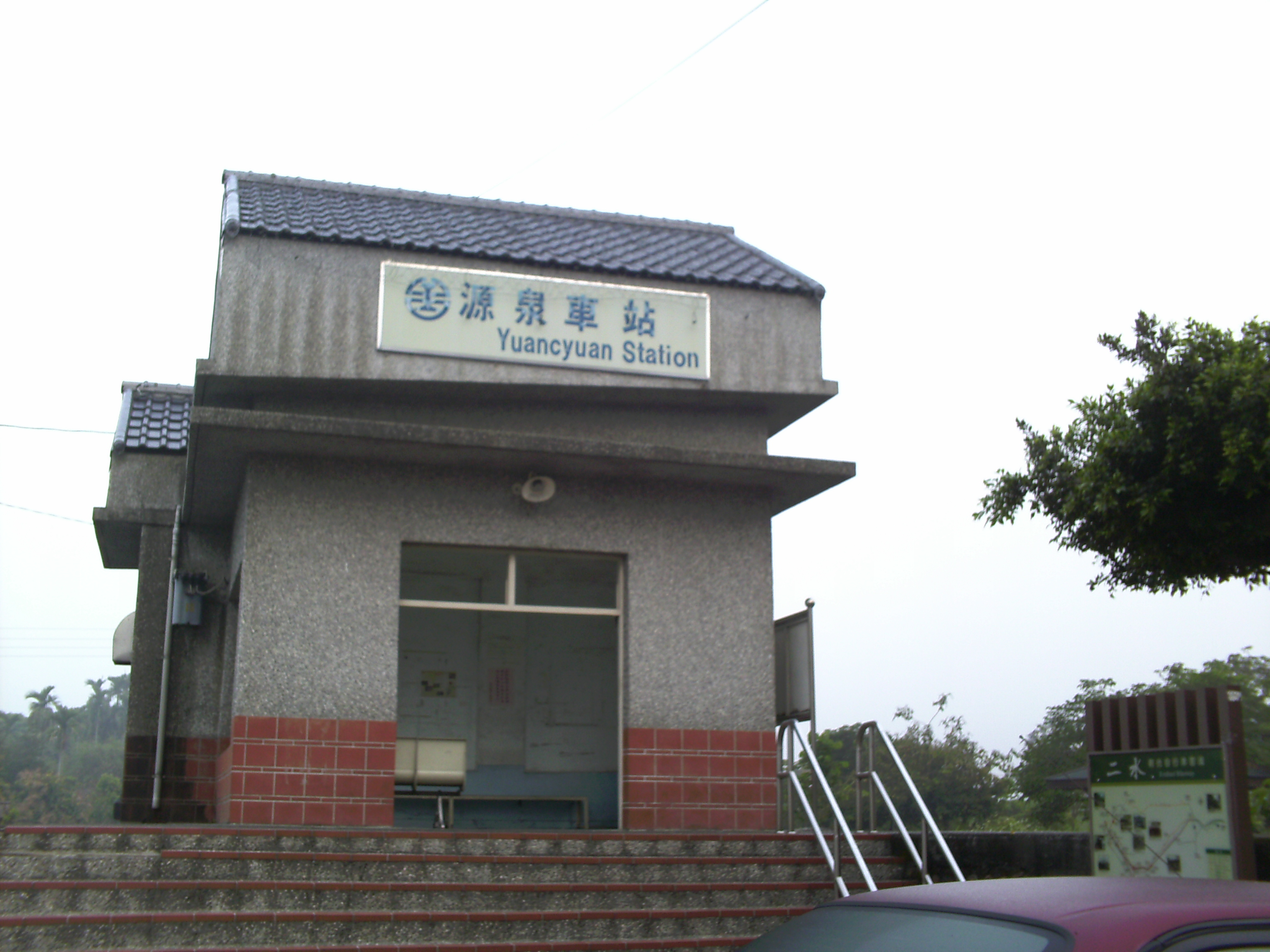 中文（台灣）: 源泉車站